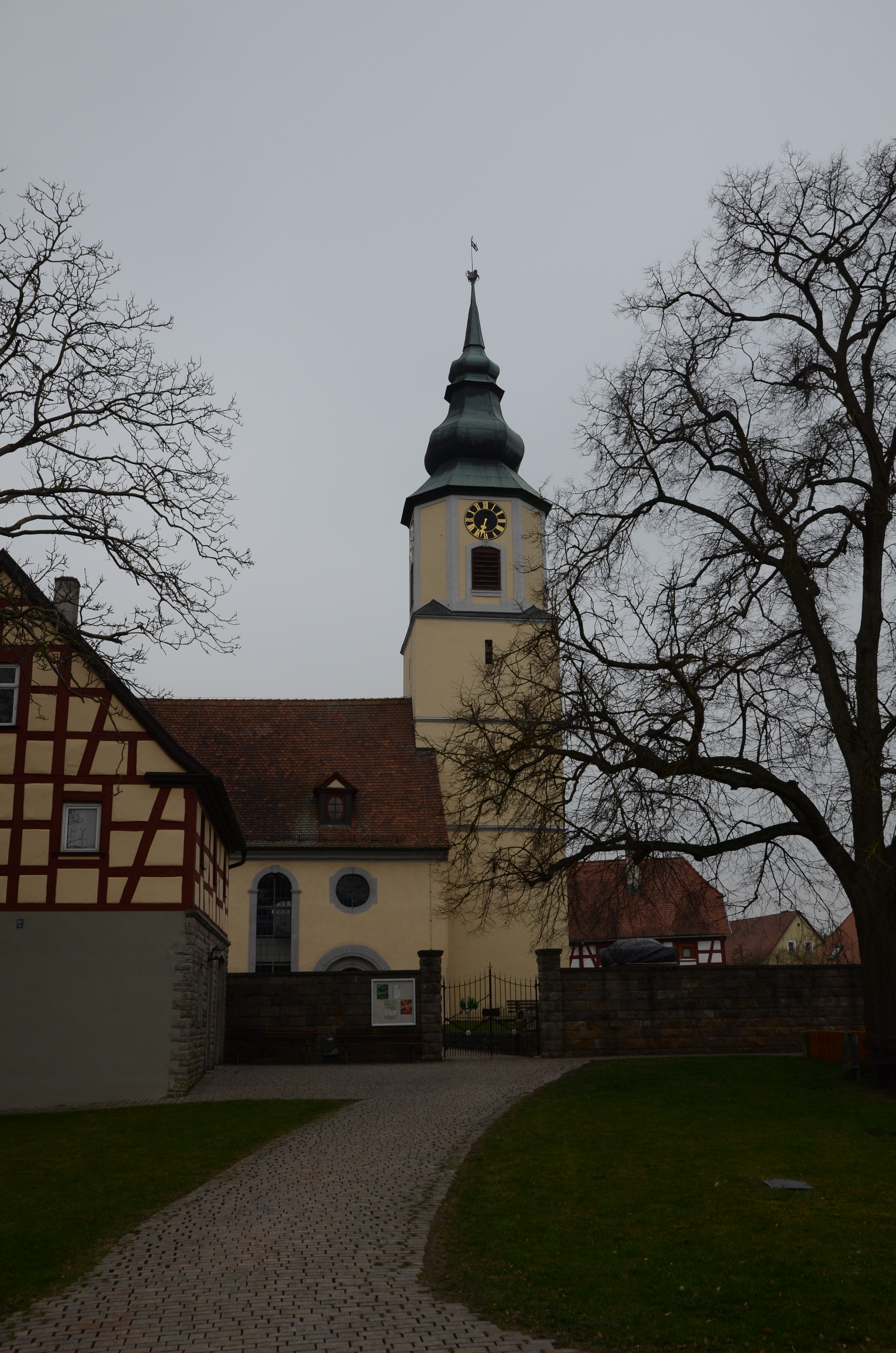 evang.-luth. Kirche St. Gumbertus in Westheim